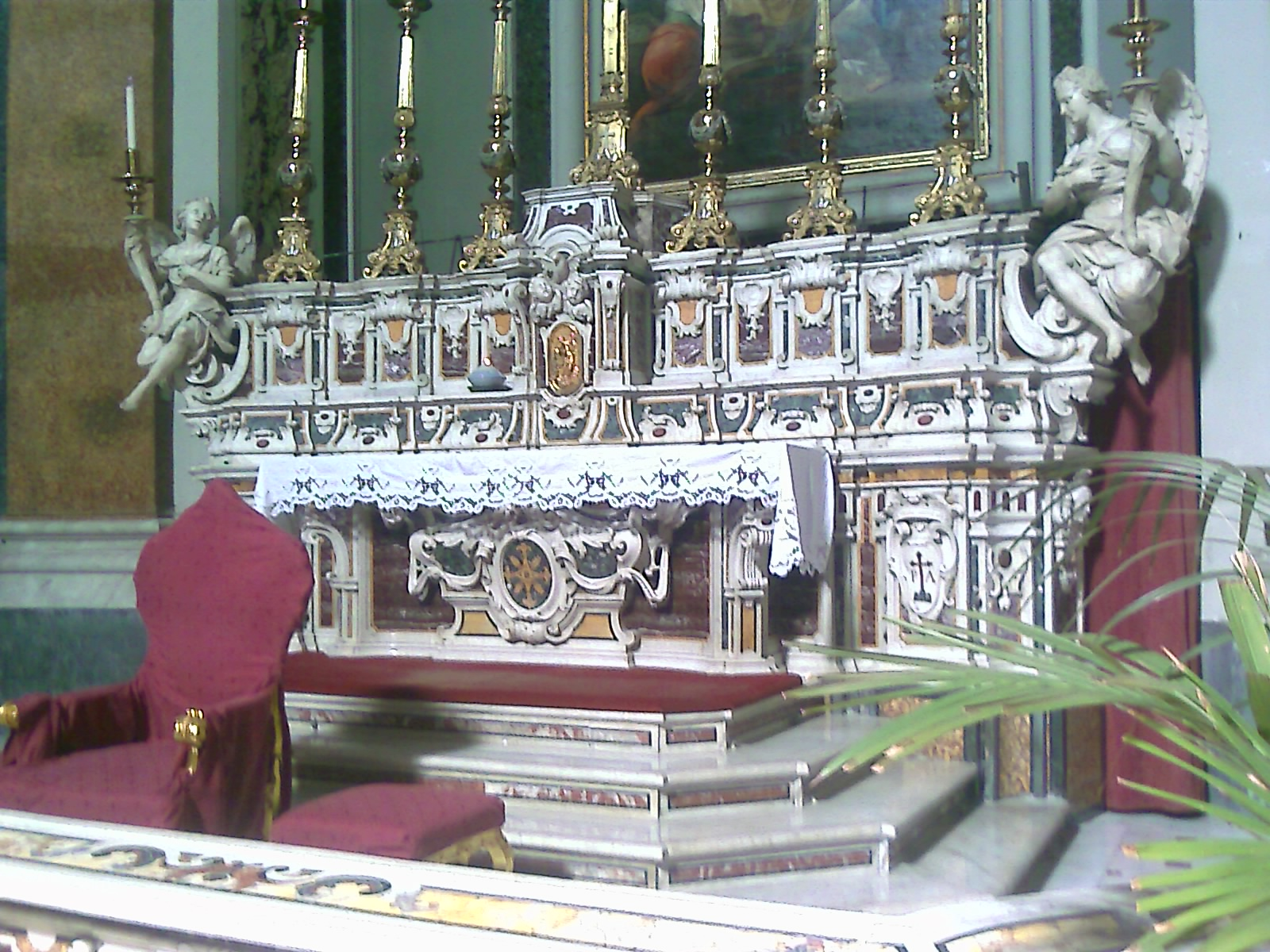 Chiesa di Santa Maria di Caravaggio: Altar